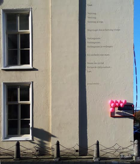 Gedicht "Laat" van de Belgische dichter Leonard Nolens, hoek Kanonstraat en Prinsessegracht, Den Haag (Nederland)